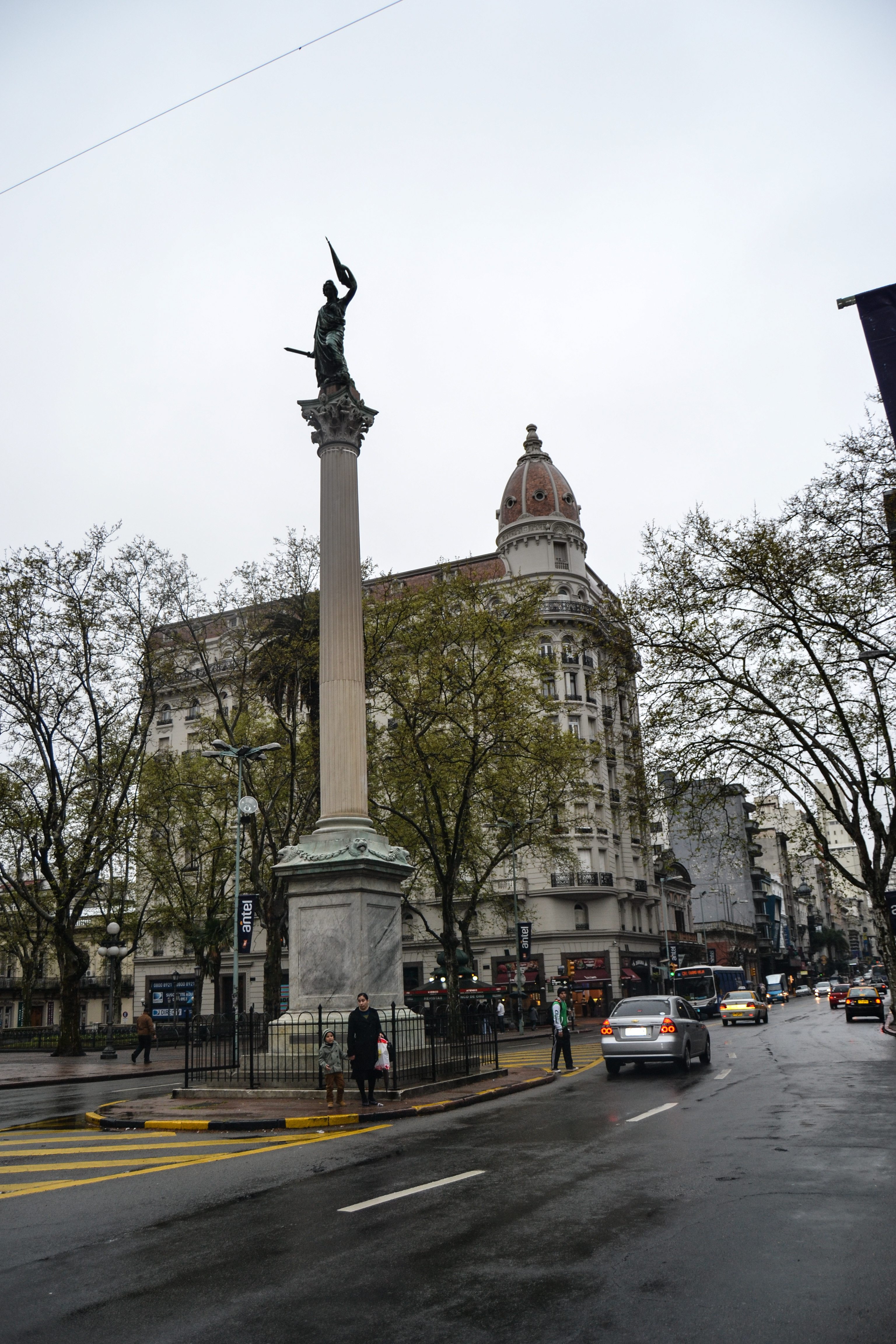 Columna de la Paz o Estatua de la Libertad. Ubicada en el departamento de Montevideo